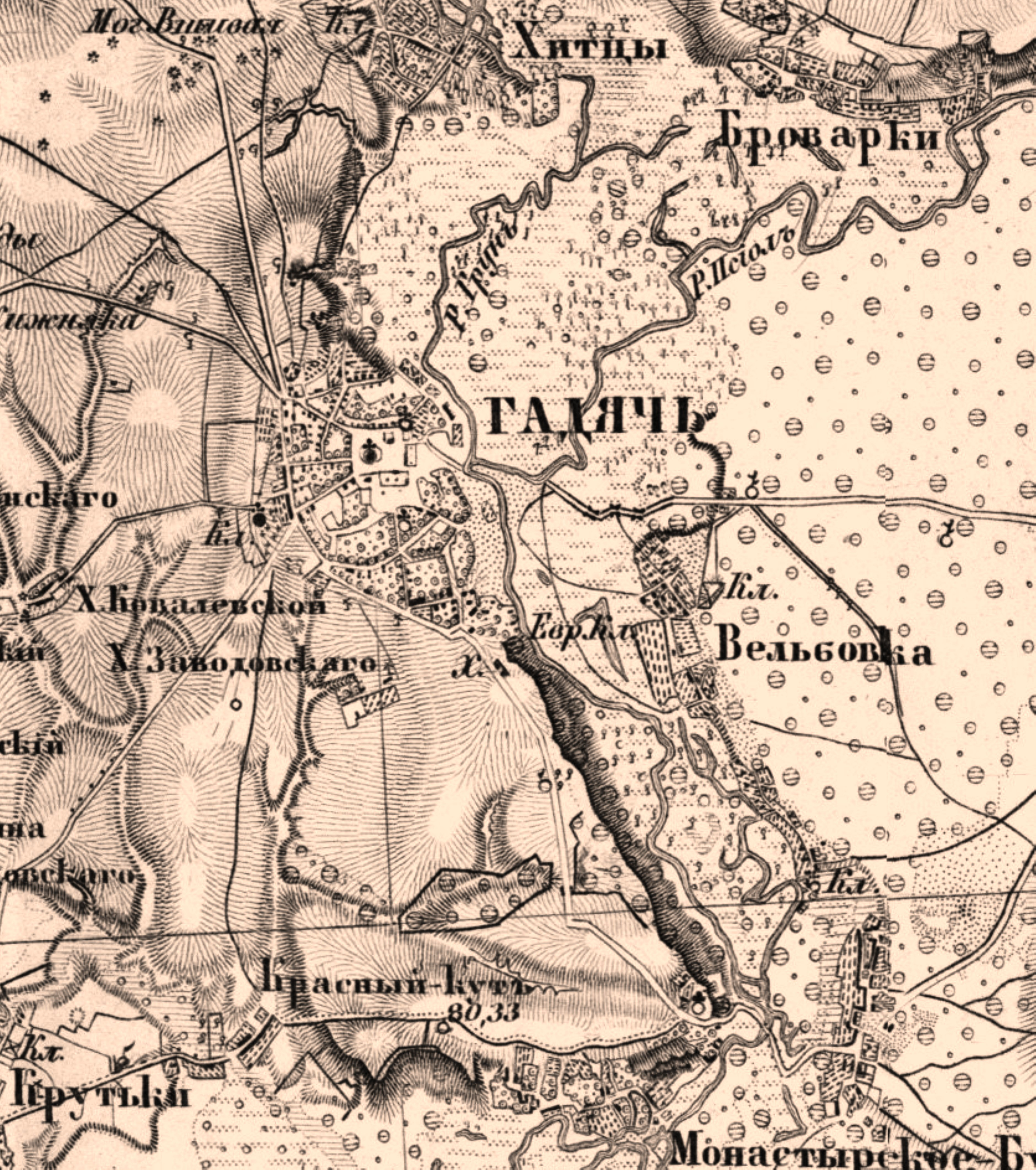 Город Гадяч времён Российской Империи